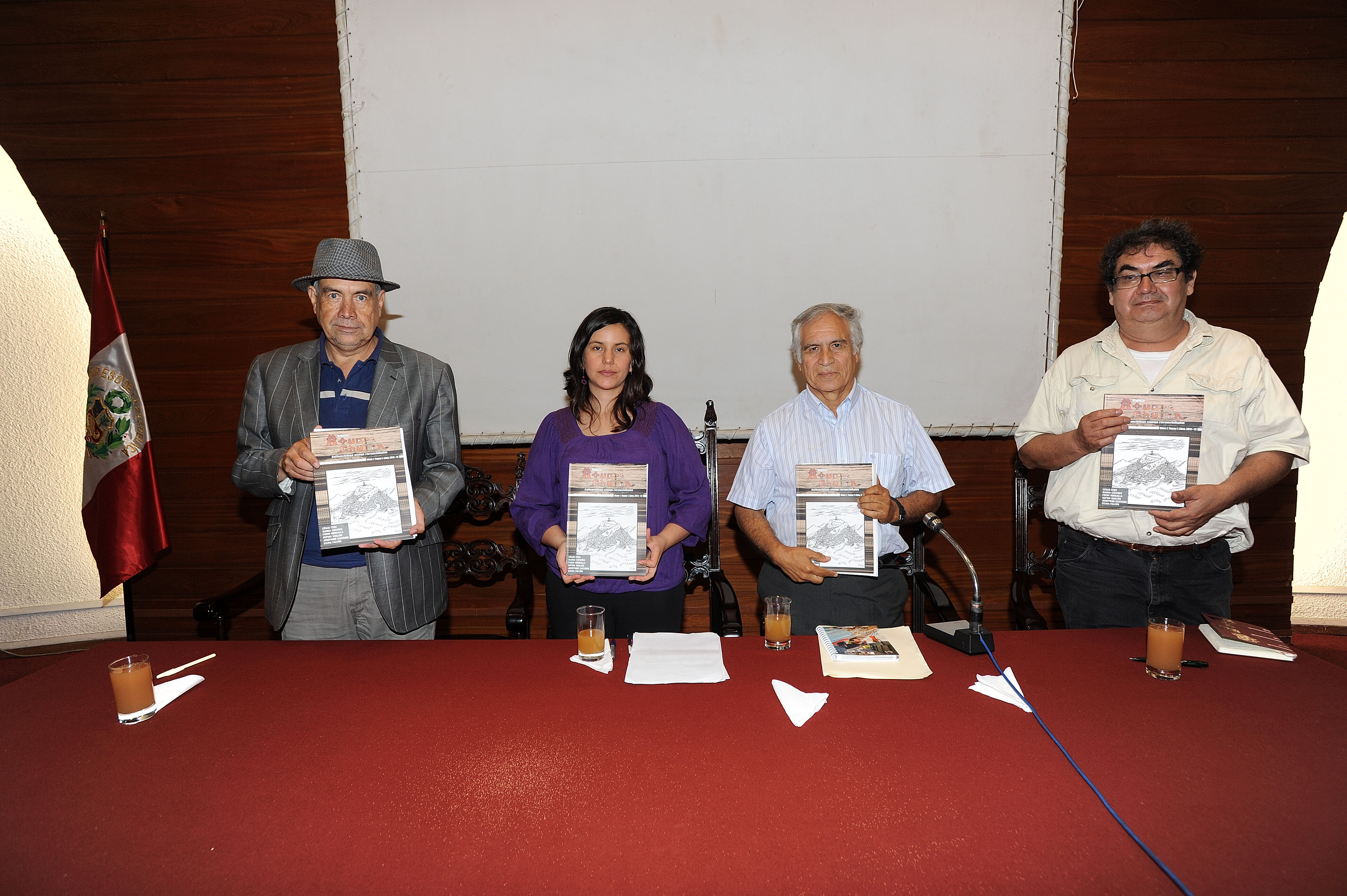 Los congresistas Hugo Carrillo Cavero (NGP) y Verónika Mendoza Frisch (NGP) presentaron esta noche la Revista Quechua Atuqpa Chupan, donde destacan la revaloración del idioma quechua y la tradición andina.